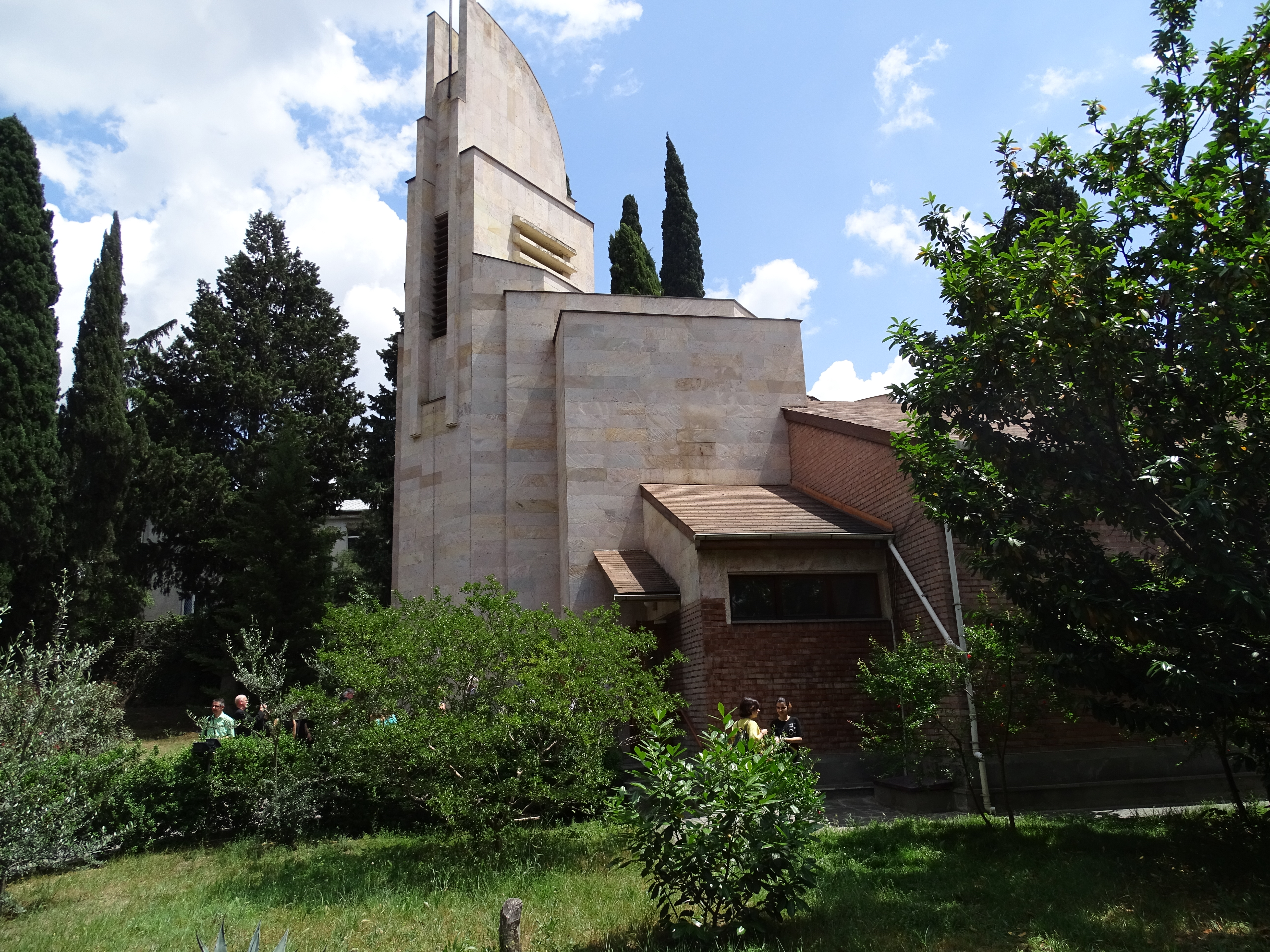 Lutherische Versöhnungskirche Tiflis